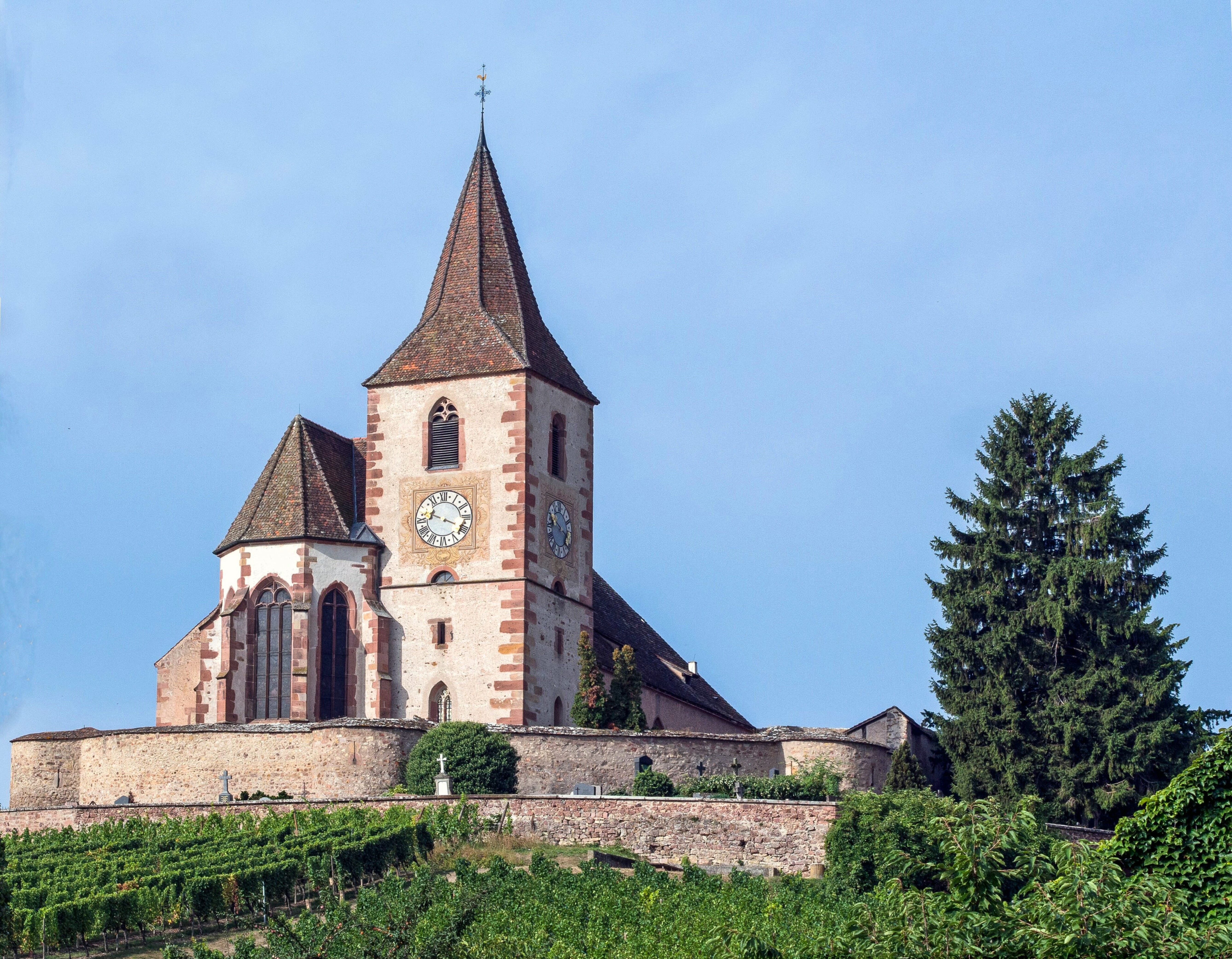 Simultankirche im Elsass